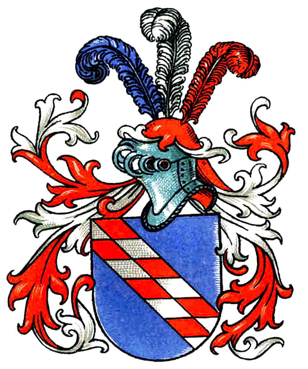 Wappen derer von Wiese und Kaiserswaldau